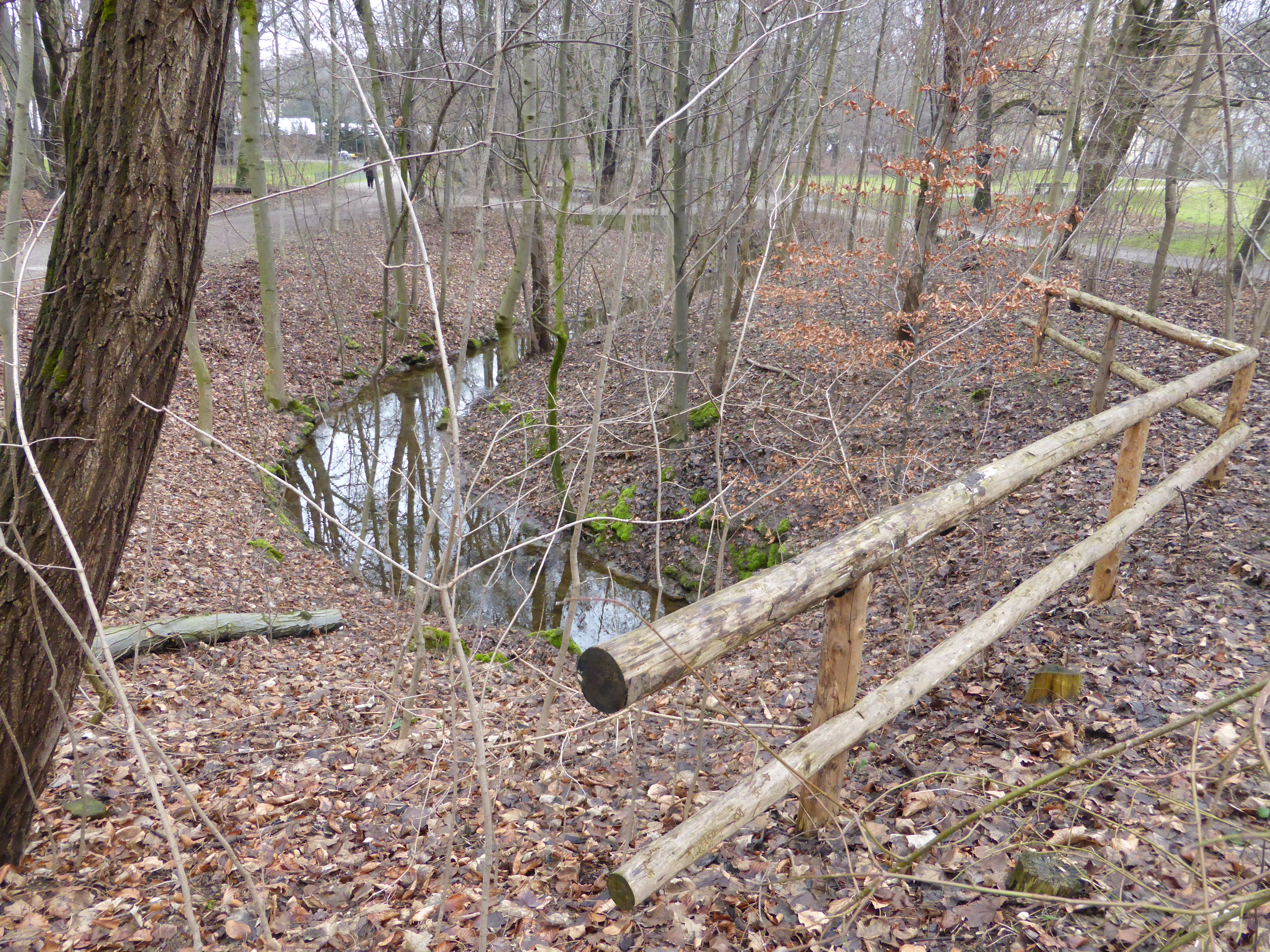 Freibadbächl Frühlingsanlagen München, fließt weiter zur Stadtgärternei